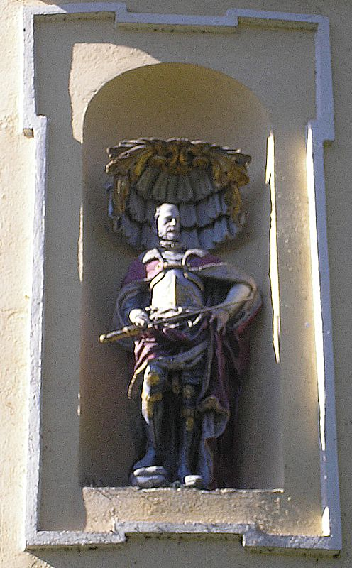 Wallfahrtskirche St. Rasso (Grafrath, Landkreis Fürstenfeldbruck, Oberbayern). Standbild des Grafen Rasso am Chorschluß. Eigene Aufnahme, Okt. 2006 / Pilgrimage church St. Rasso near Grafrath (Upper Bavaria, Germany). Statue of Count Rasso at the choir. Own photo, Oct. 2006